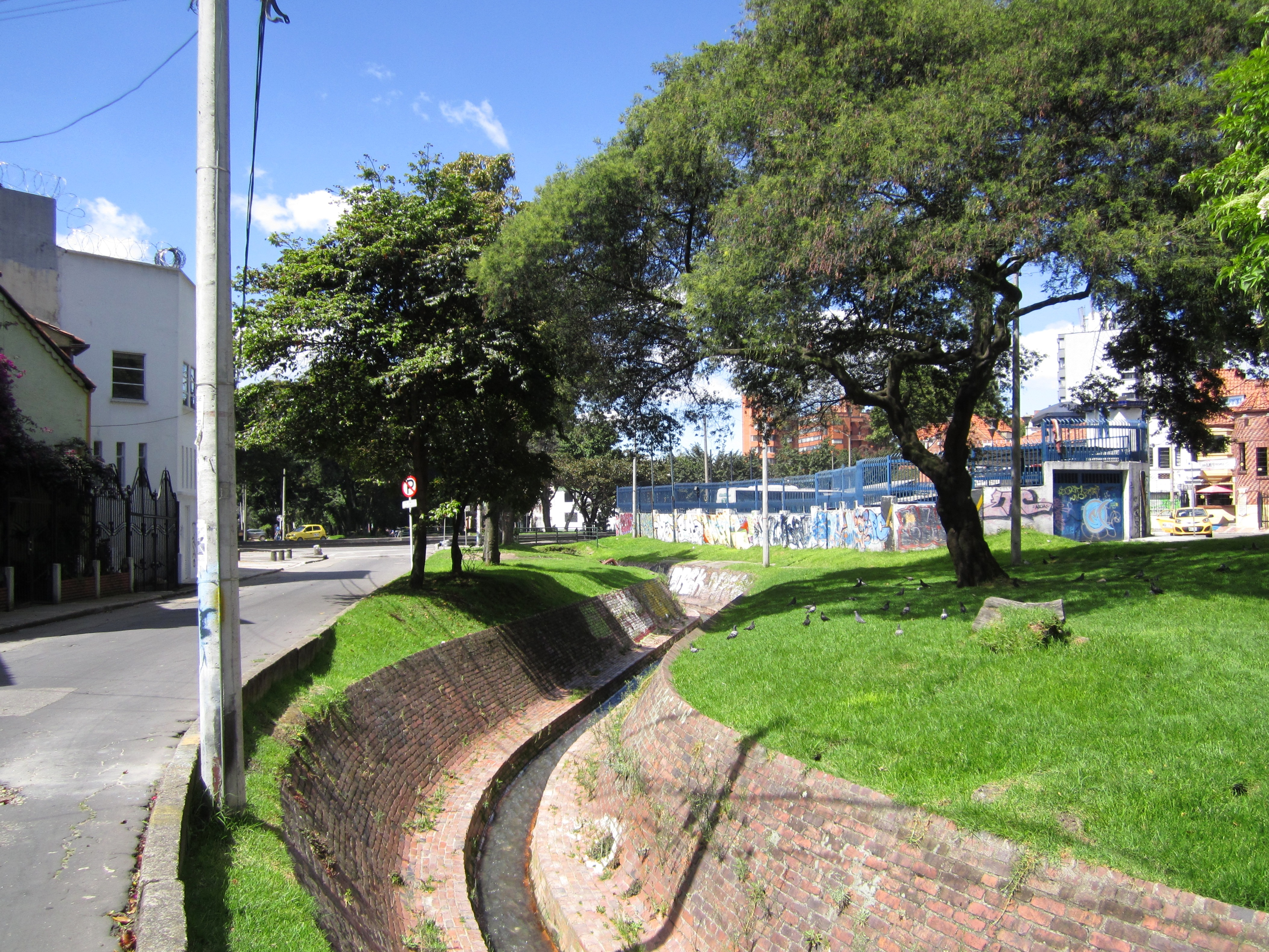 El río Arzobispo entre la carrera 13 y la avenida Carcas.